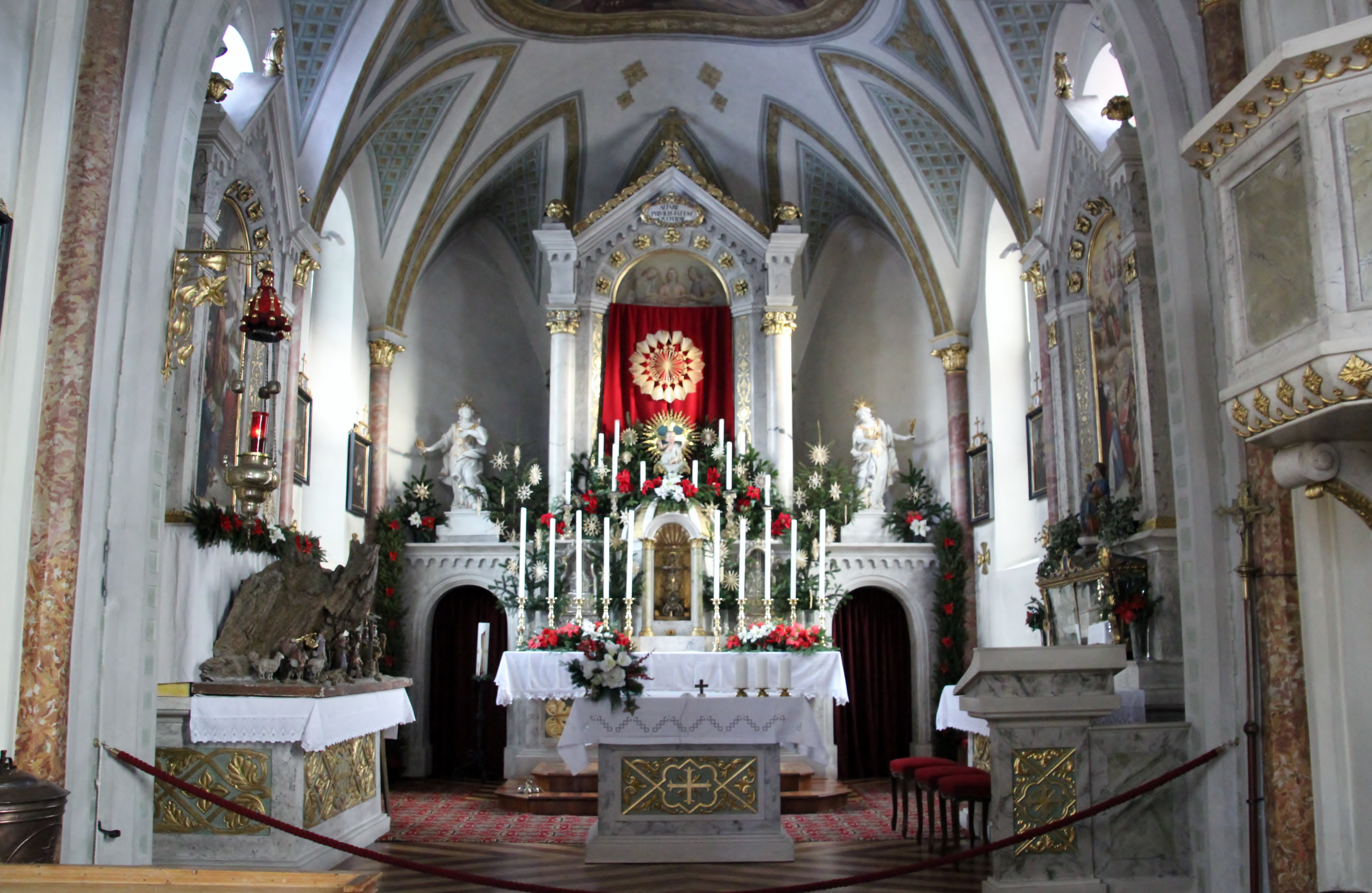 Pfarrkirche St. Katharina in Aufhofen - Altarraum